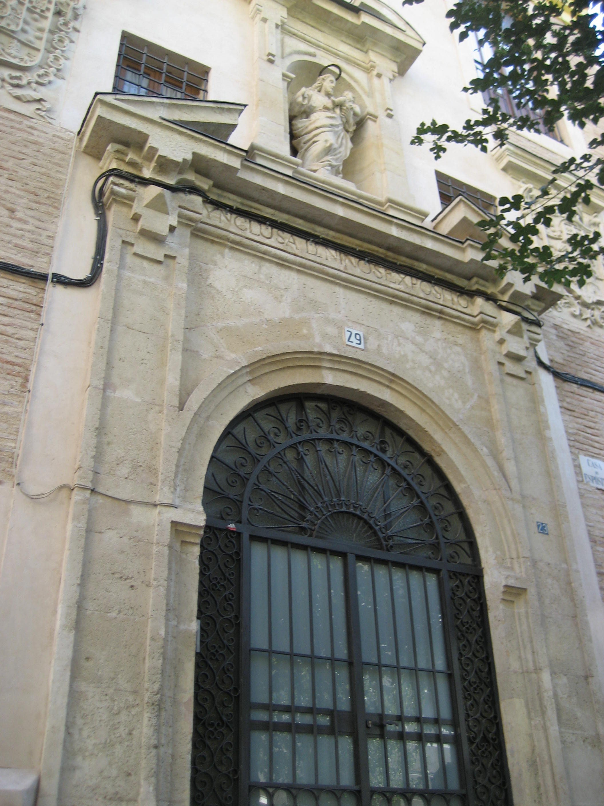 uno de los tres escudos de la fachada